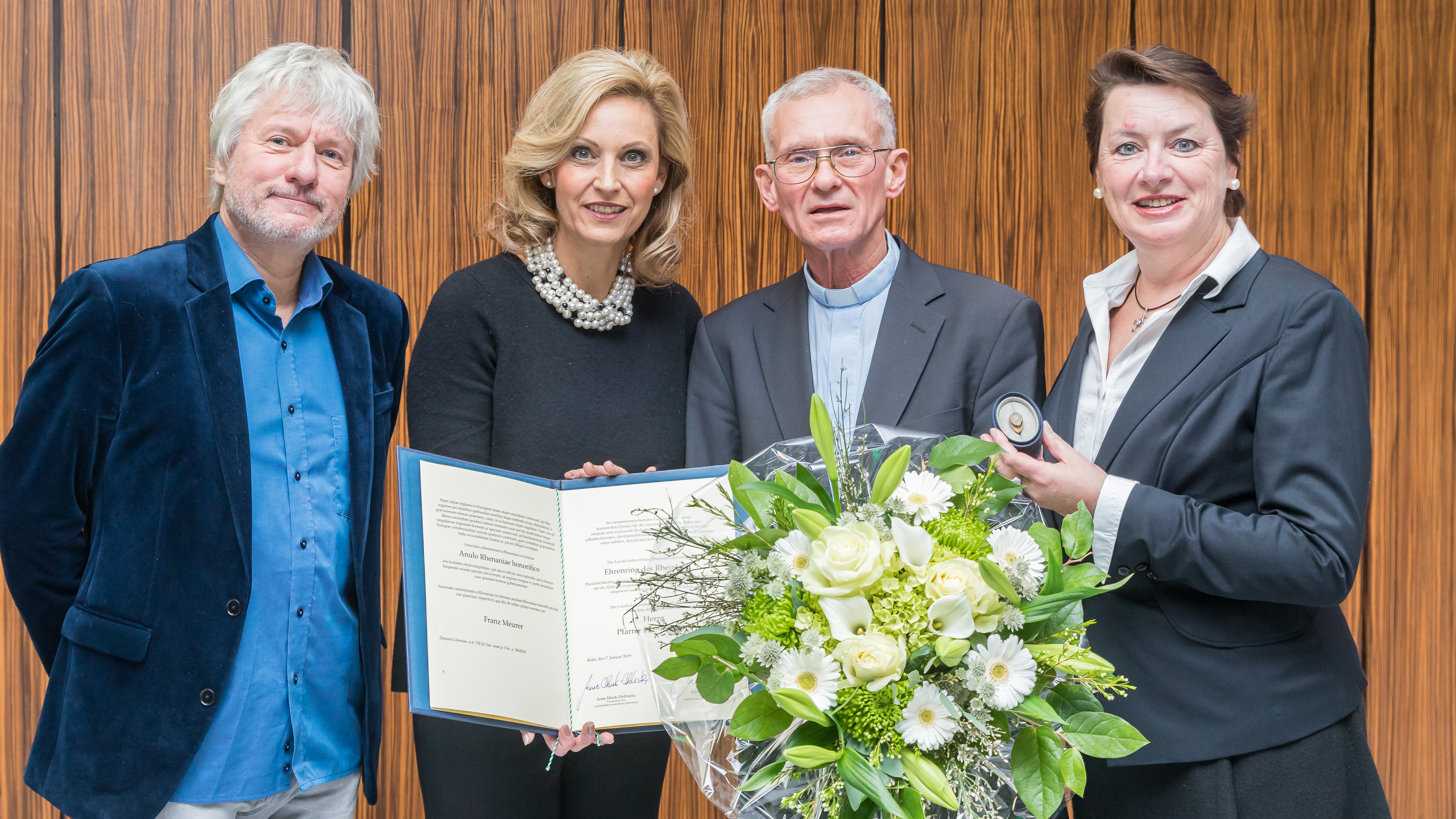 Verleihung des Ehrenringes des Rheinlandes durch den Landschaftsverband Rheinland (LVR) an den Kölner Pfarrer Franz Meurer. Veranstaltungsort: Rheinlandsaal im LVR-Landeshaus Foto: Jürgen Becker (Moderator), Ulrike Lubek (Direktorin des Landschaftsverbandes Rheinland), Pfarrer Franz Meurer und Anne Henk-Hollstein (Vorsitzende der Landschaftsversammlung Rheinland)